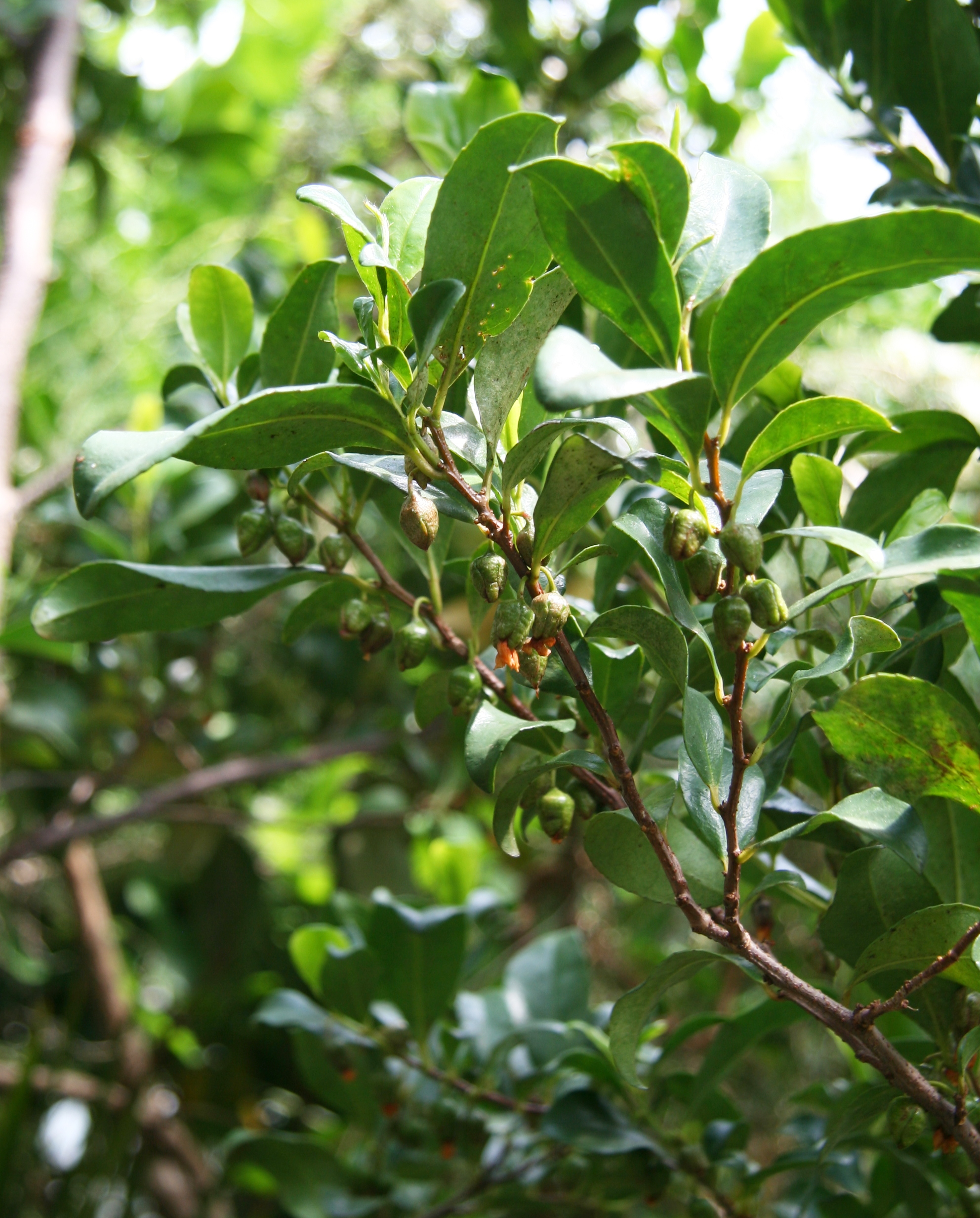 Visnea mocanera im Botanischen Garten Dresden